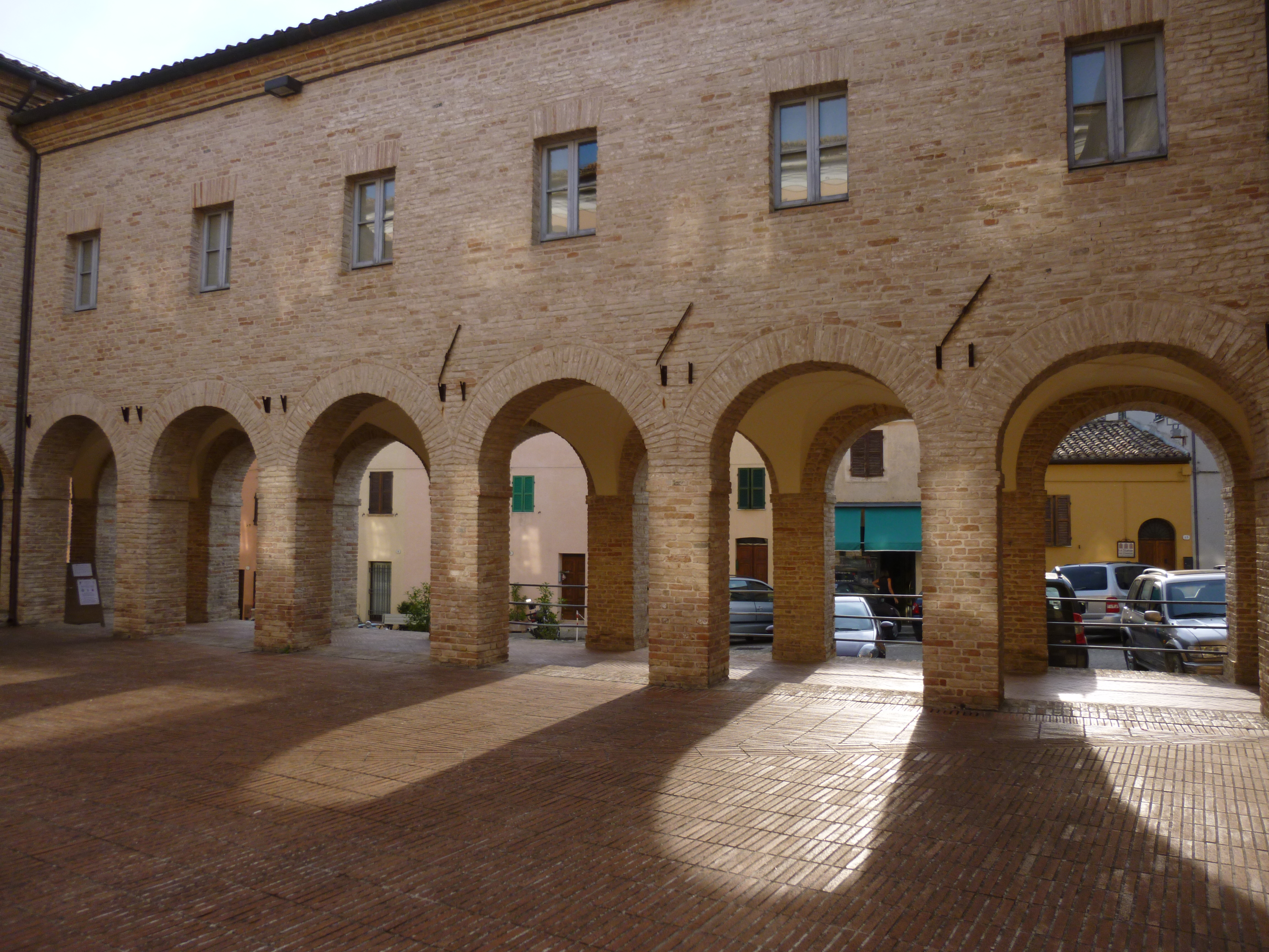 Chiostro di San Francesco This is a photo of a monument which is part of cultural heritage of Italy.